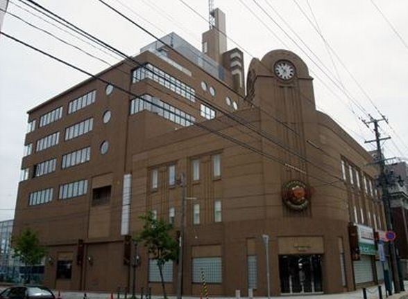 北島三郎記念館